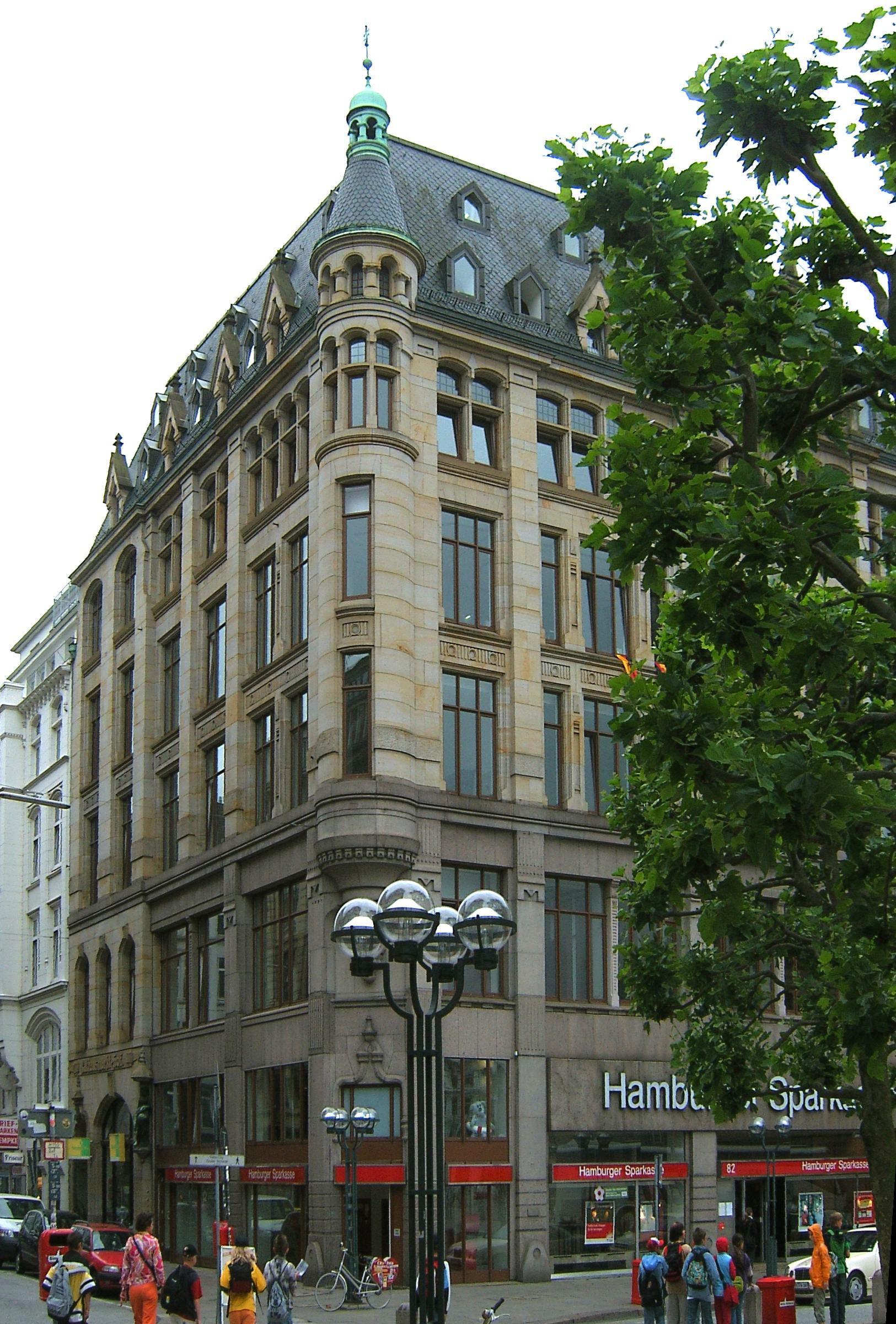 Der Rathausmarkthof in der Kleinen Johannisstraße 4 in Hamburg-Altstadt wurde 1899 nach Entwürfen von Hanssen & Meerwein gebaut. This is a photograph of an architectural monument.